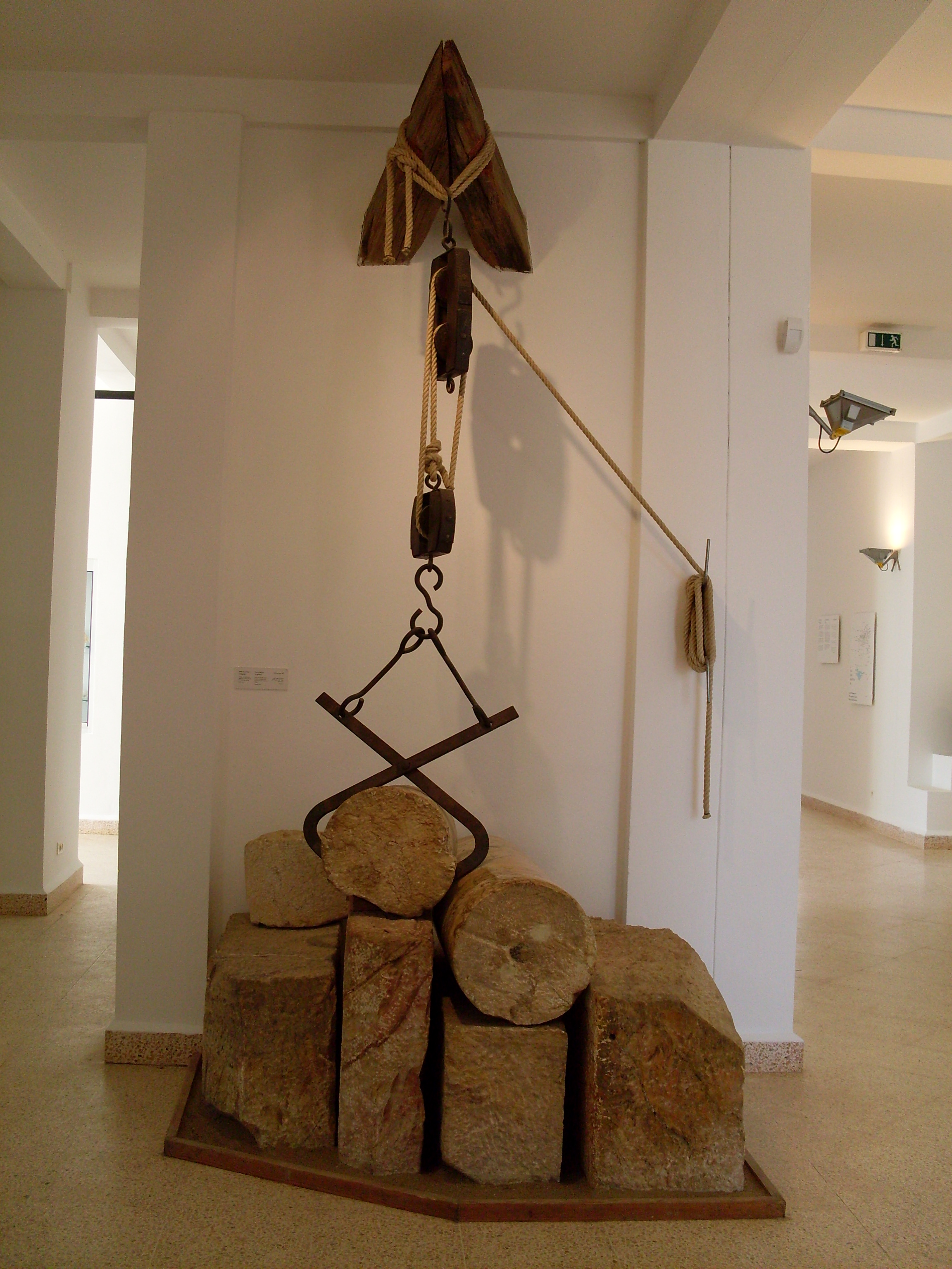 Levier romain de Marbre, musée archéologique de Chemtou, Chemtou, Gouvernerat de Jendouba, Tunisie